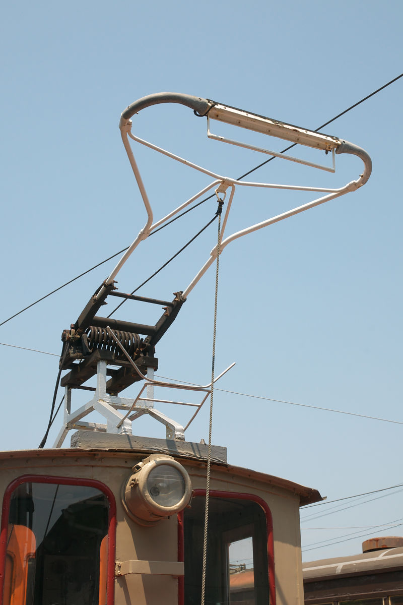 銚子電鉄デキ3のビューゲル。